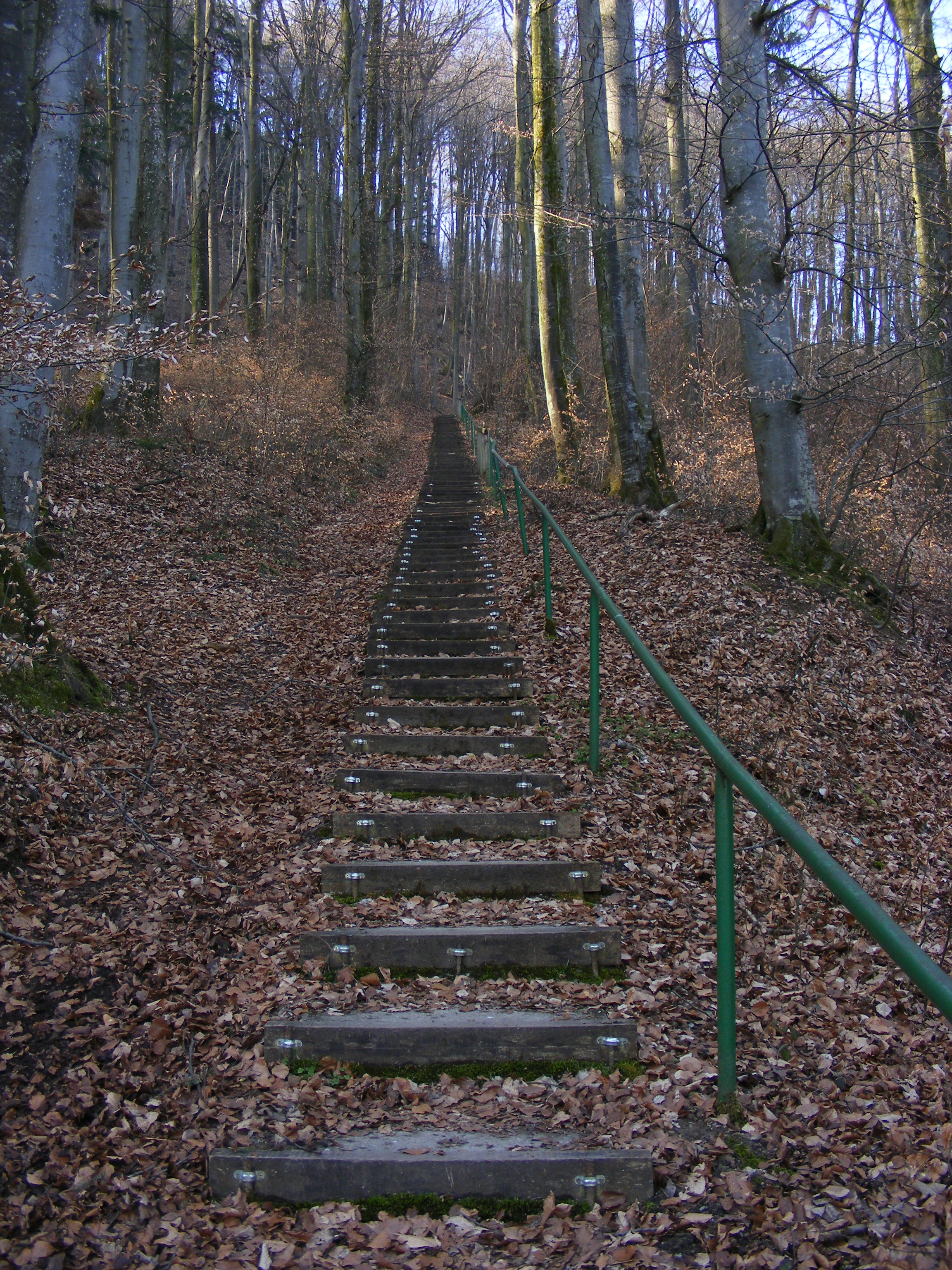 "Plainstiege", Stiege auf den Plainberg, Bergheim, Land Salzburg; sie führt auf der Nordseite des Plainbergs zur Wallfahrtsbasilika Maria Plain